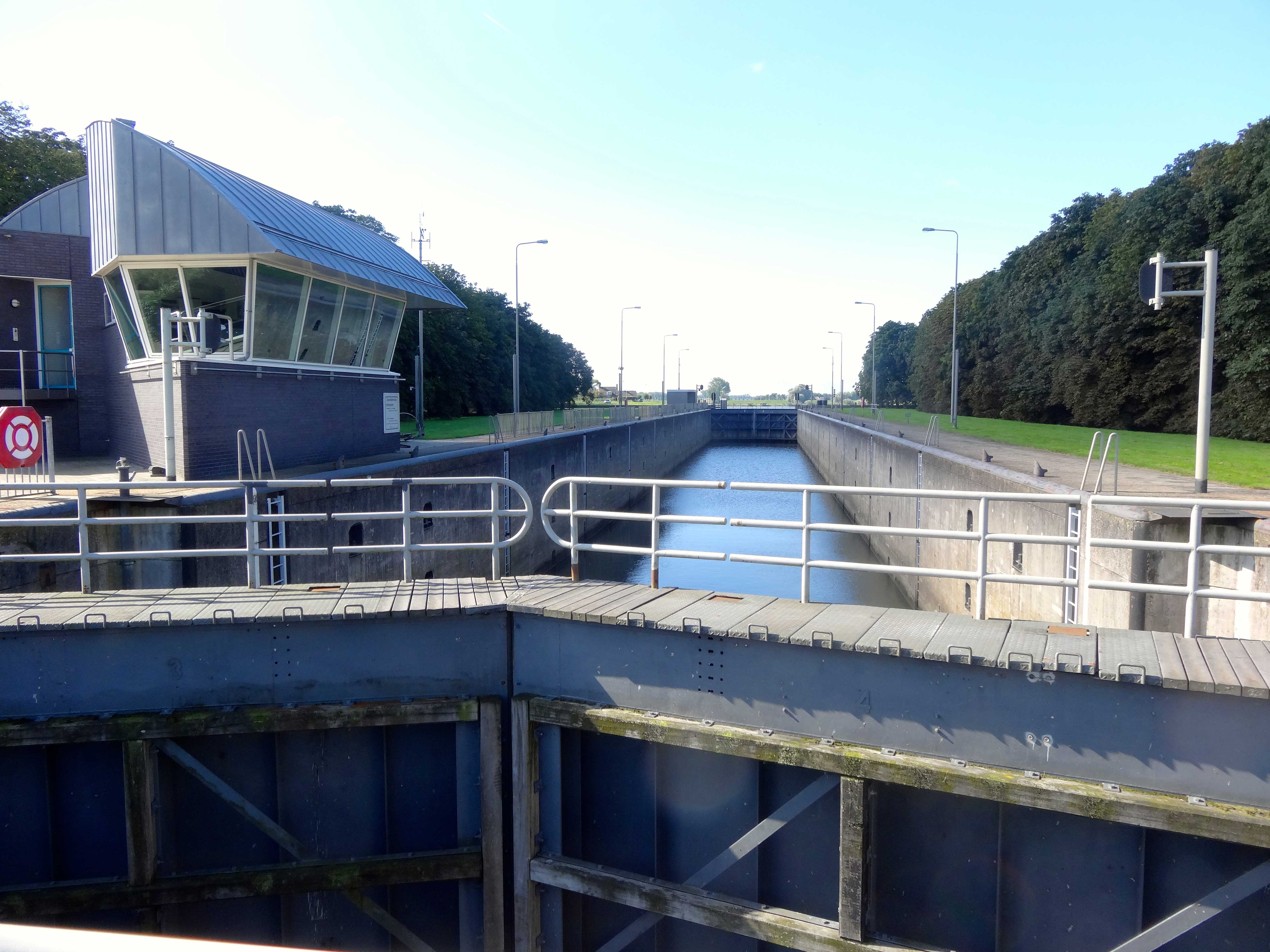 Zicht op Zwolle vanaf de Nilantsweg in Spoolde